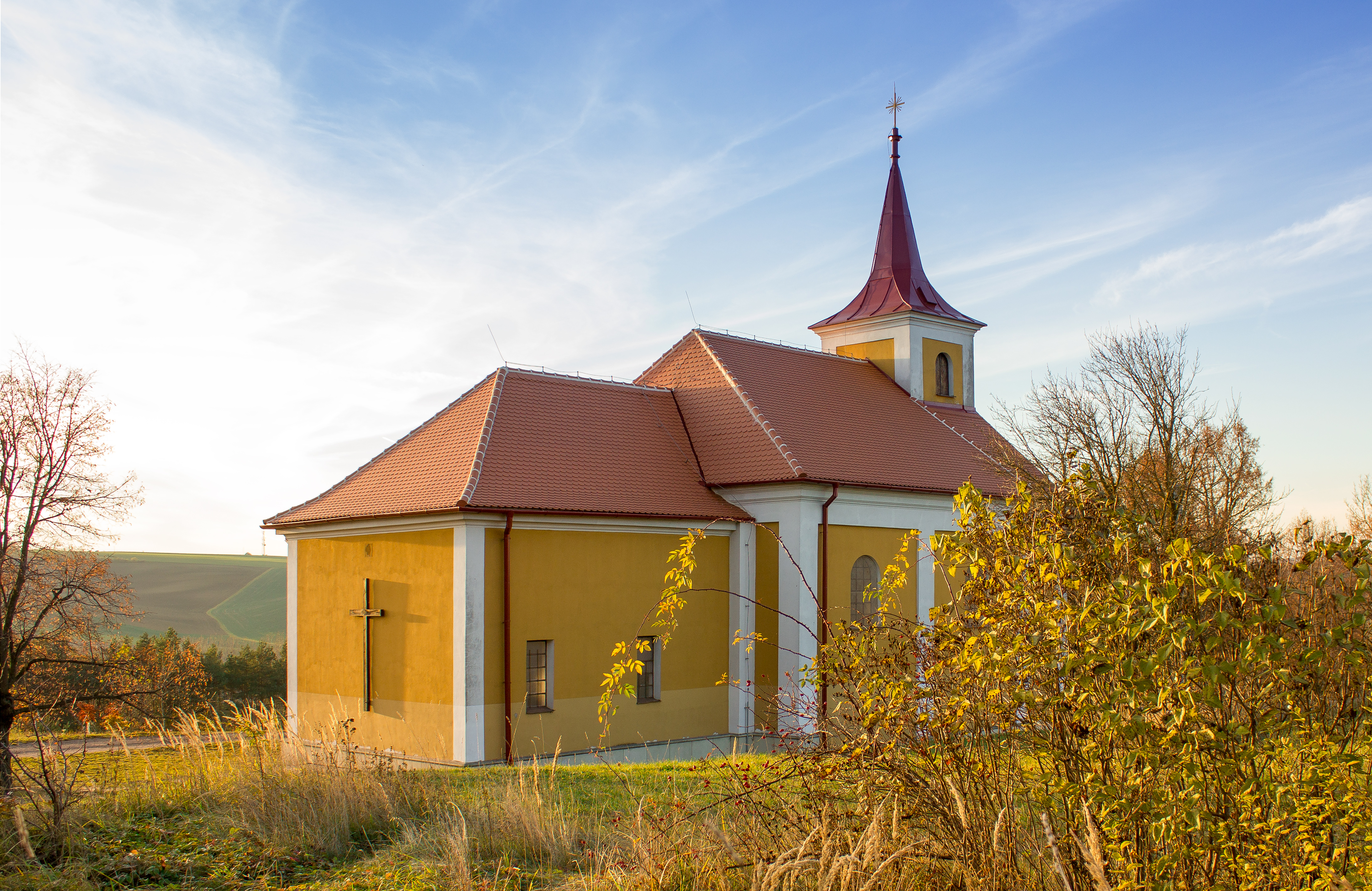 Lutršték, poutní místo, kostel Panny Marie Bolestné.